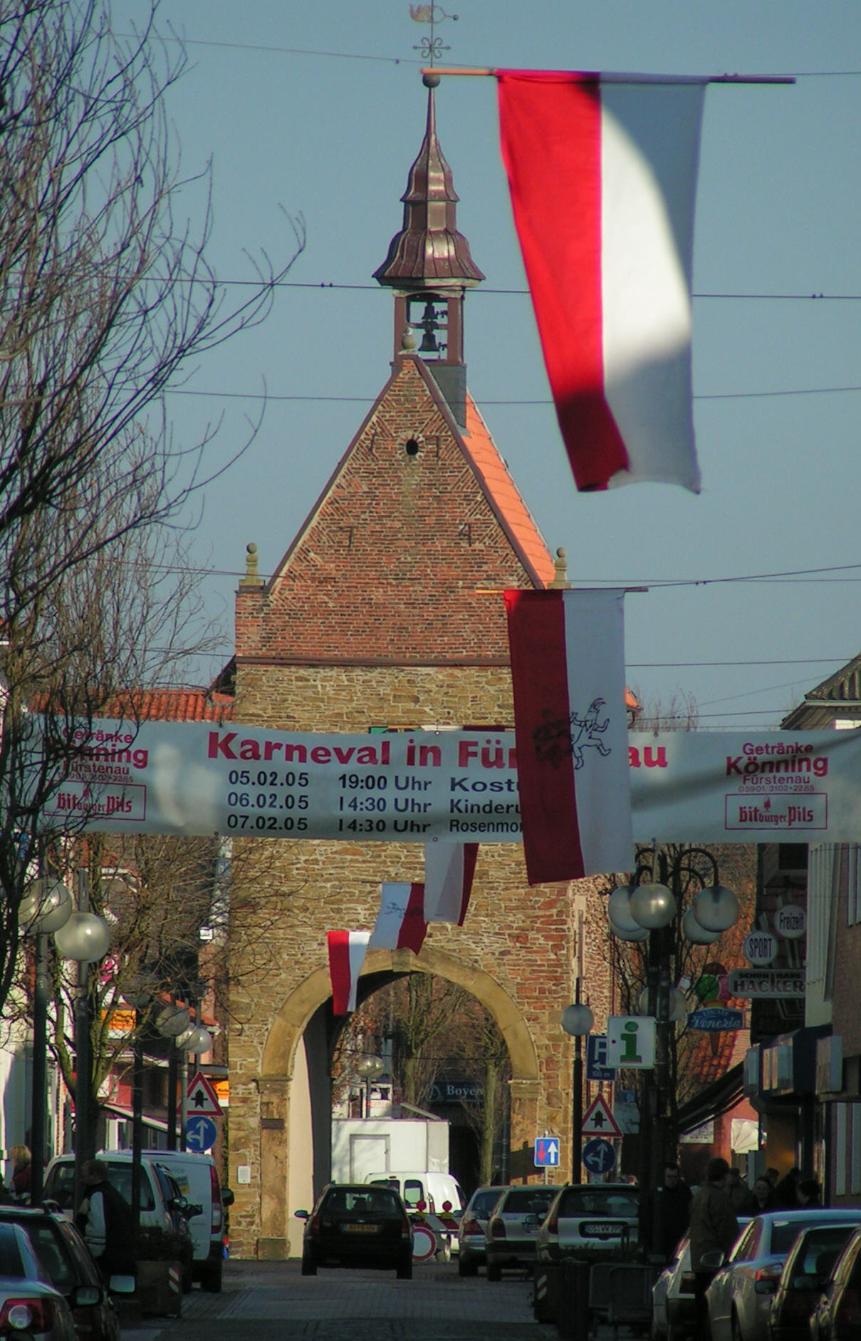 Altstadt und Hohes Tor in Fürstenau